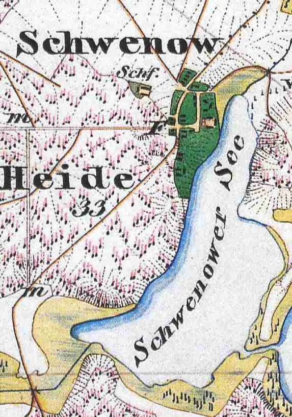 Schwenow, bewohnter Gemeindeteil im Ortsteil Limsdorf, Stadt Storkow (Mark), Lkr. Oder-Spree, Brandenburg, Deutschland, Ausschnitt aus dem Urmesstischblatt 3850 Kossenblatt von 1846